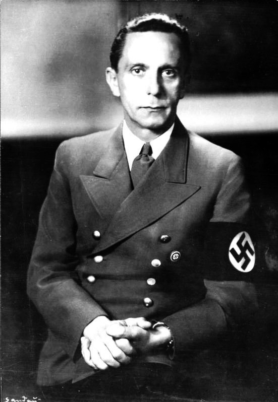 Joseph Goebbels ADN-ZB/Archiv Joseph Goebbels, faschistischer Politiker, Hauptkriegsverbrecher, geb. 29.10.1897 in Rheydt, gest. (Selbstmord) 1.5.1945 in Berlin. Er war u.a. Propagandaleiter der NSDAP, Reichspropagandaminister (seit 1933) und "Reichsbevollmächtigter für den totalen Kriegseinsatz" (seit 1944). Unterstützt vom Finanzkapital, baute Goebbels das Propagandaministerium zum Lenkungsorgan der faschistischen Meinungsmanipulation aus. (Aufn.: 1942/Sandau) Abgebildete Personen: Goebbels, Joseph: Reichsminister für Volksaufklärung und Propaganda, Gauleiter Berlin, Deutschland